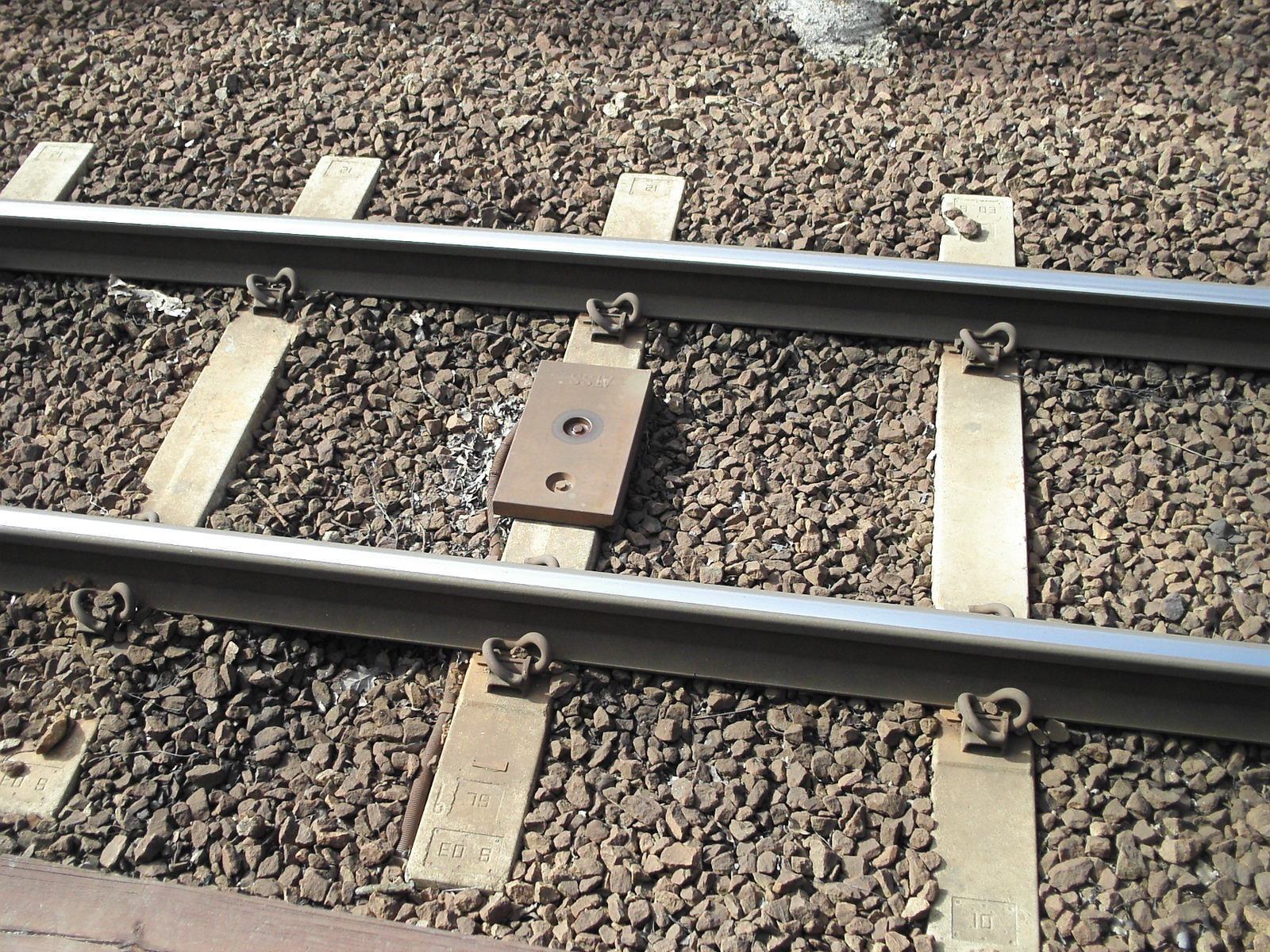 Small balis